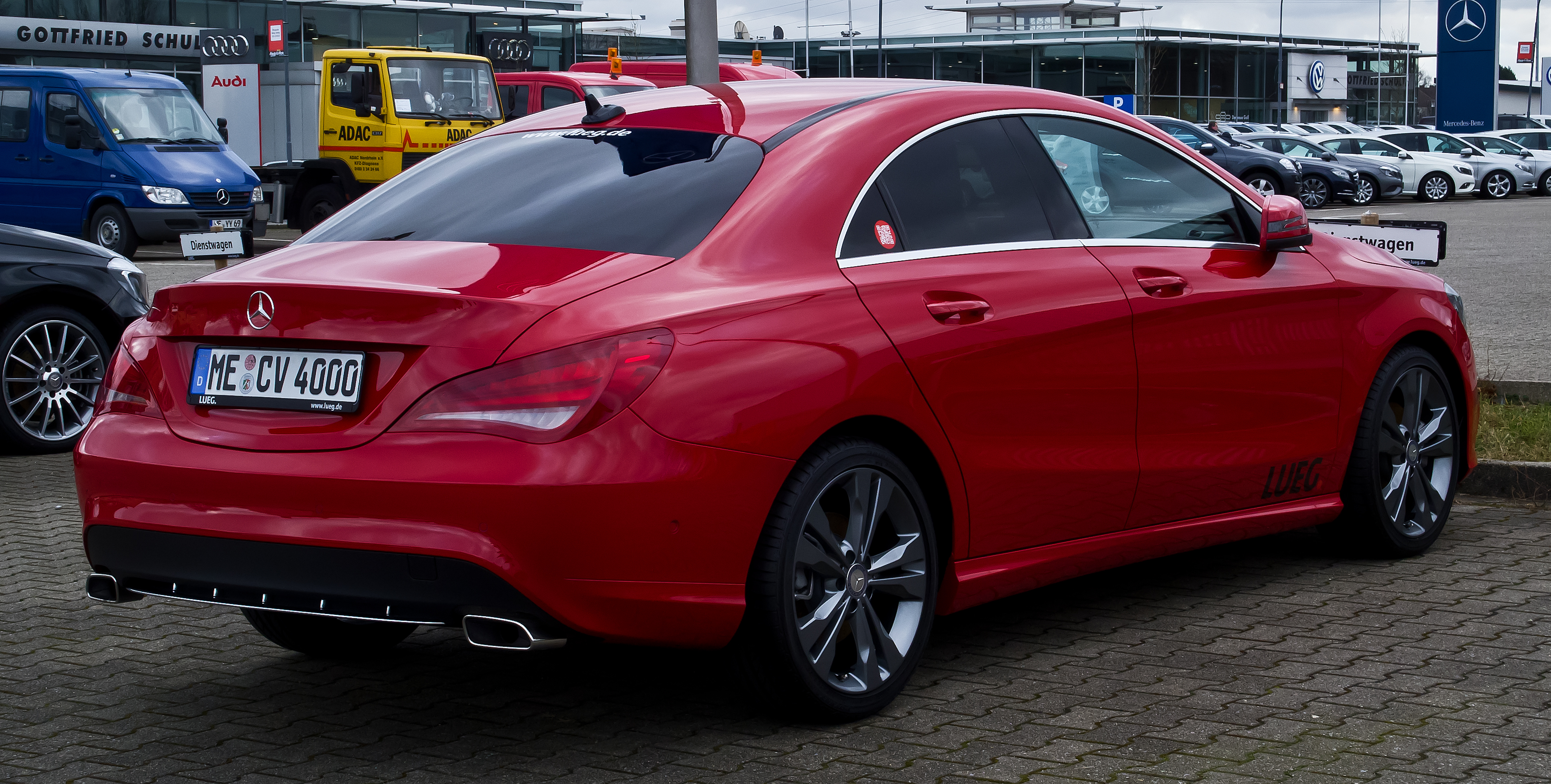 Mercedes-Benz CLA 180 Urban (C 117)